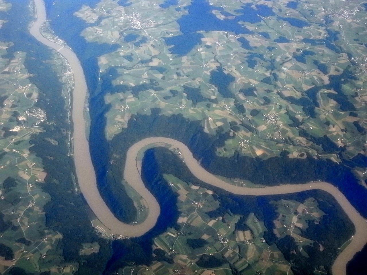 "Schlögener Schlinge", kurbiĝo de Danubo en Aŭstrio.